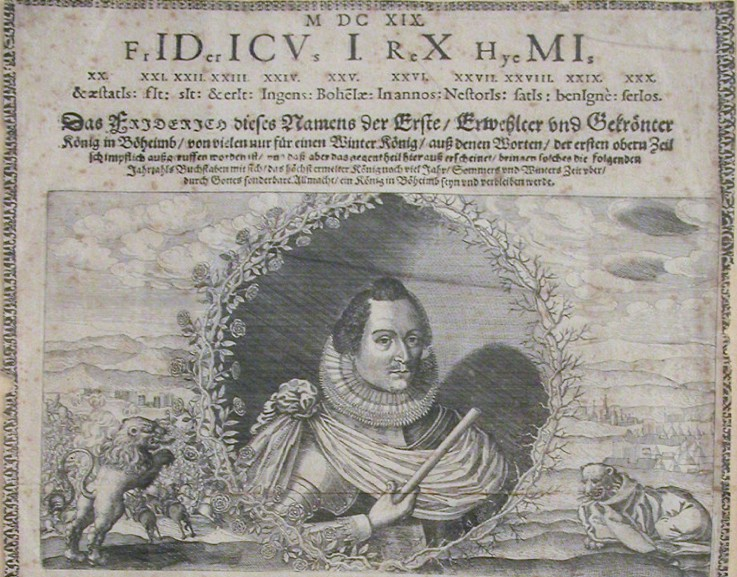 Kaiserliches Flugblatt mit der ersten Erwähnung Freidrich V. von der Pfalz als Winterkönig